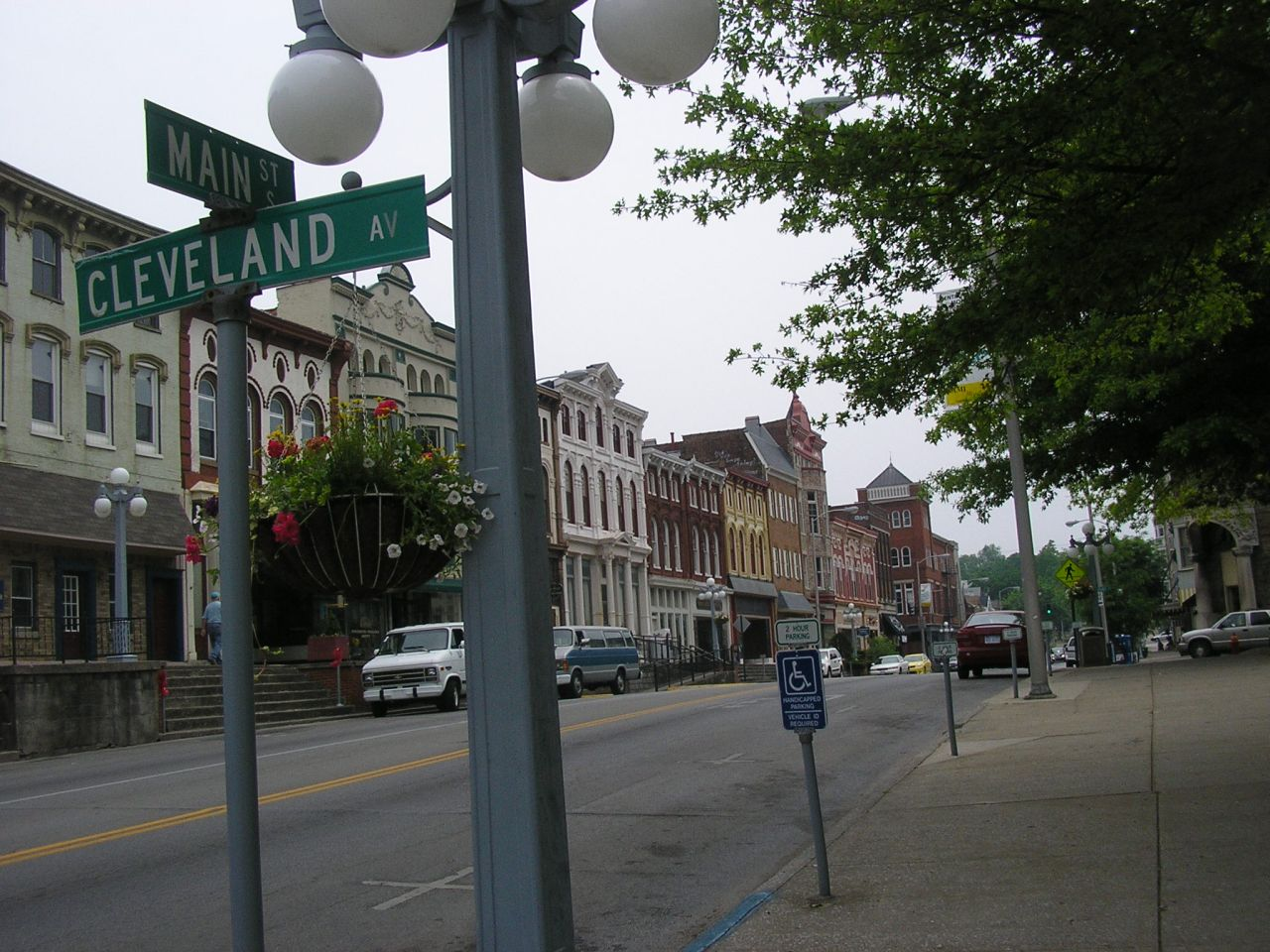 Main Street in Winchester, Kentucky